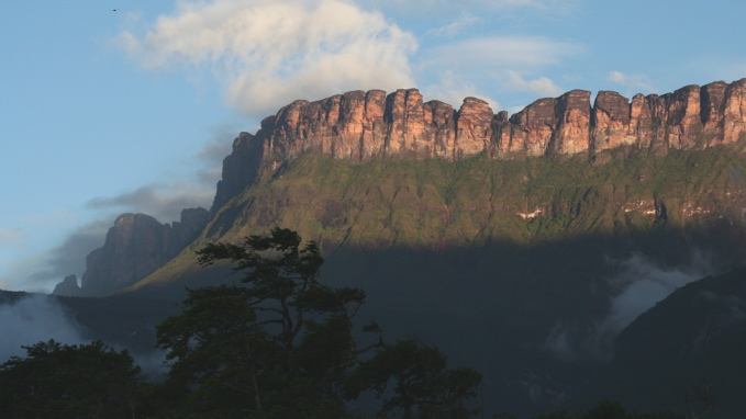 Auyan-Tepui in der Abenddämmerung vom Campo Uruyen aus gesehen